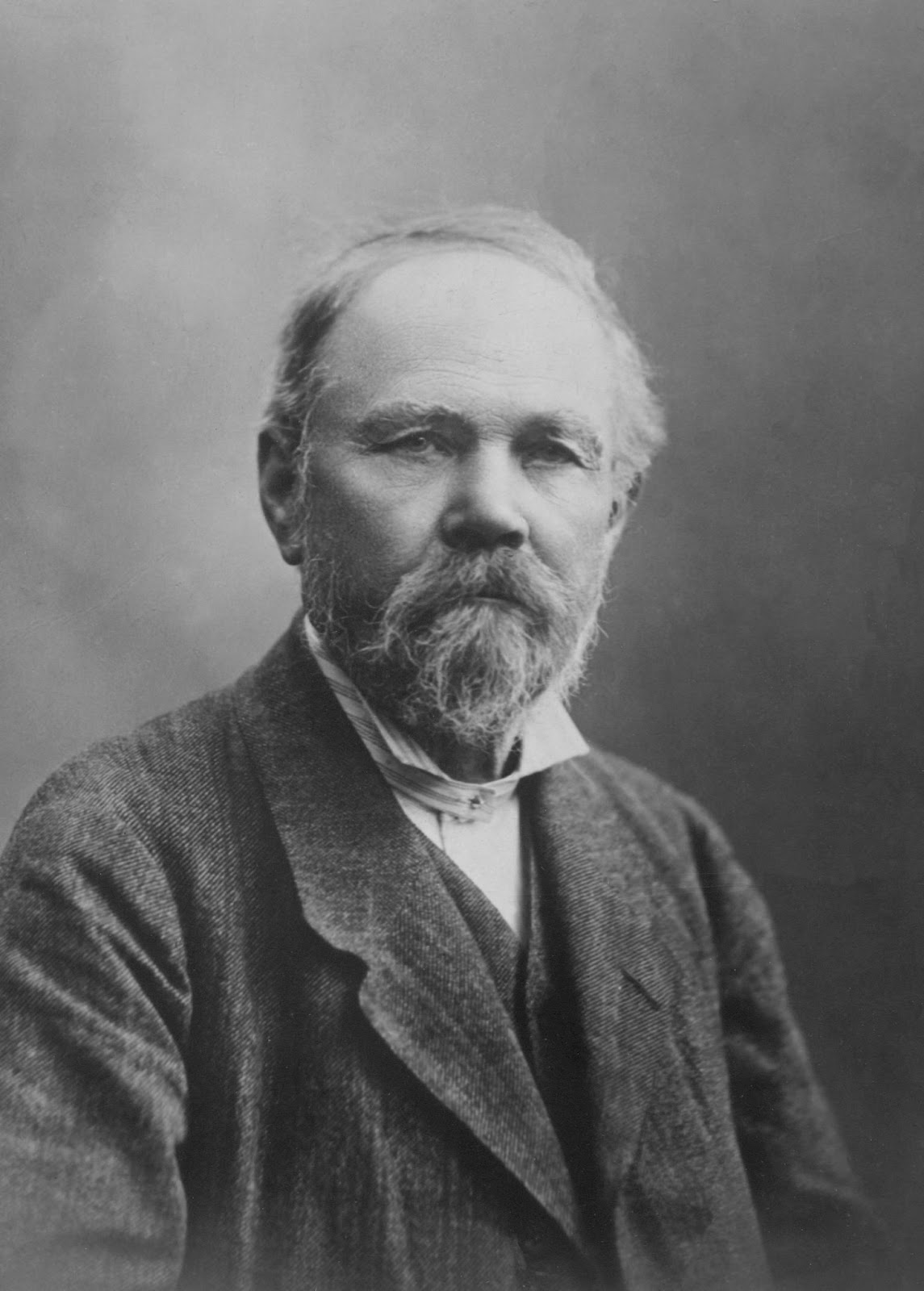 František Vymazal